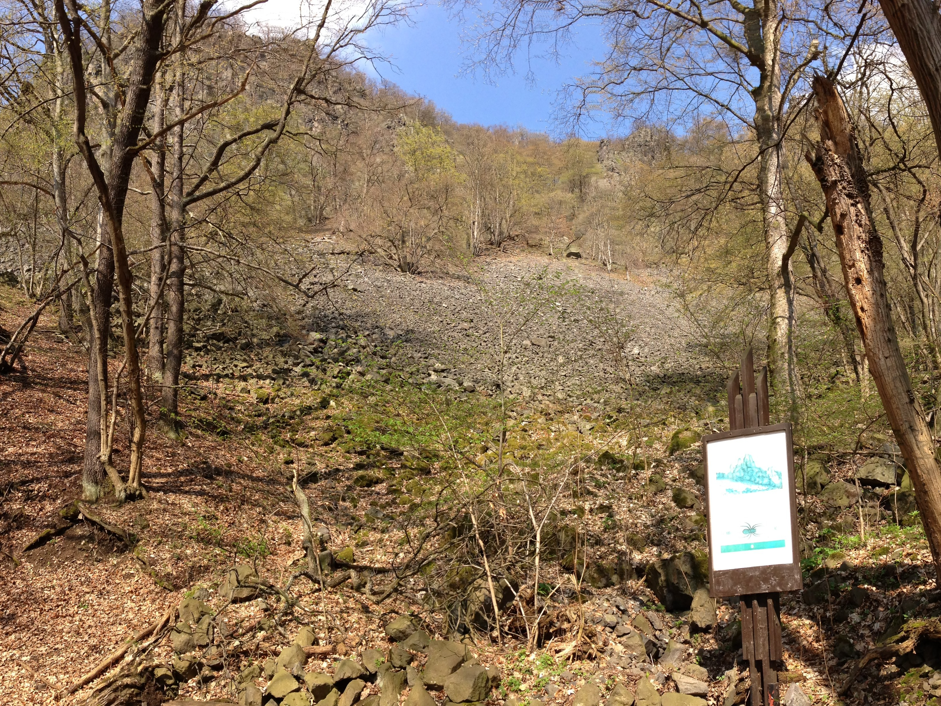 Suťová pole od Malým Ostrým v Českém středohoří